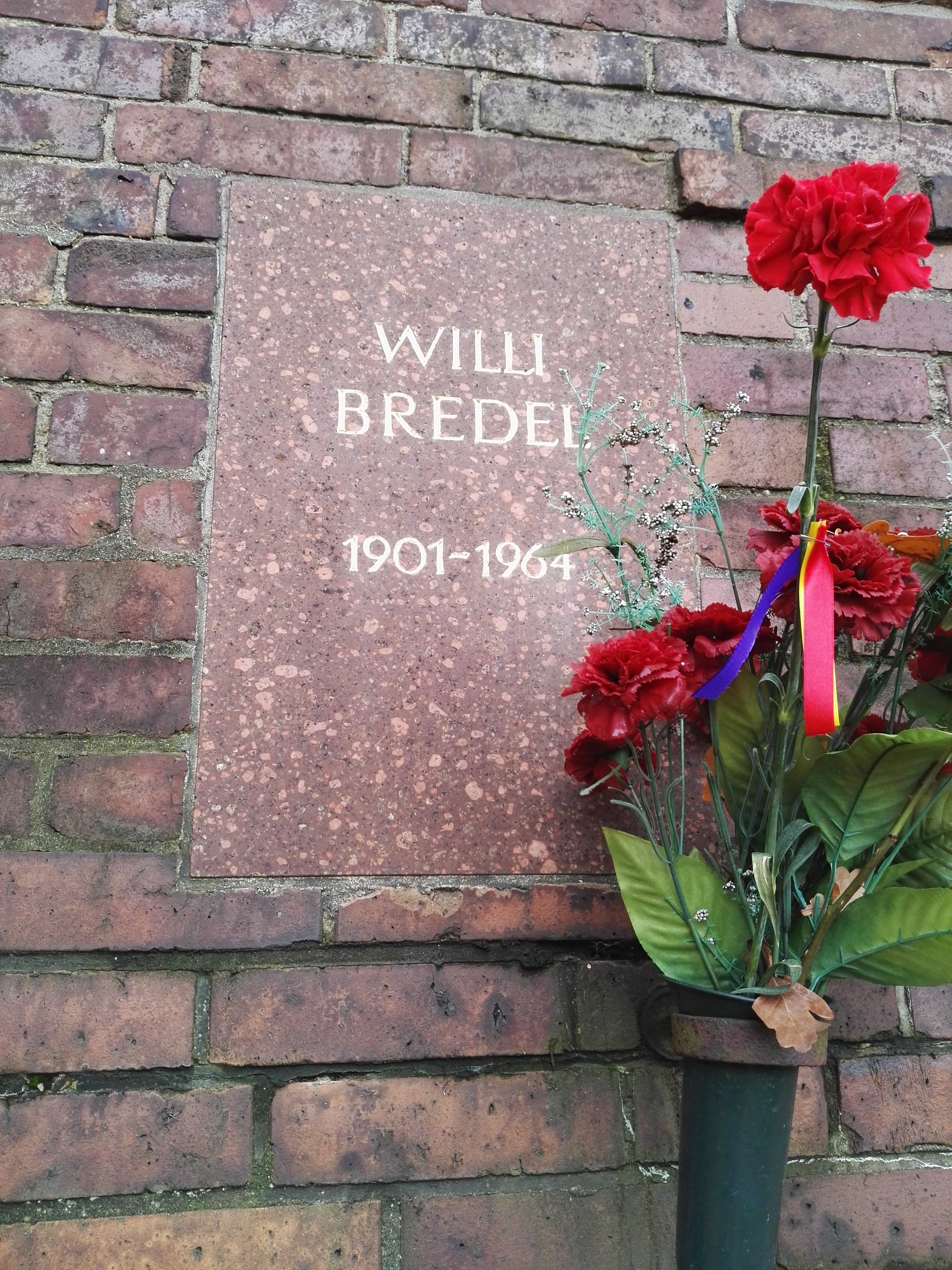 Grab von Willi Bredel in der Gedenkstätte der Sozialisten auf dem Zentralfriedhof Friedrichsfelde in Berlin-Lichtenberg